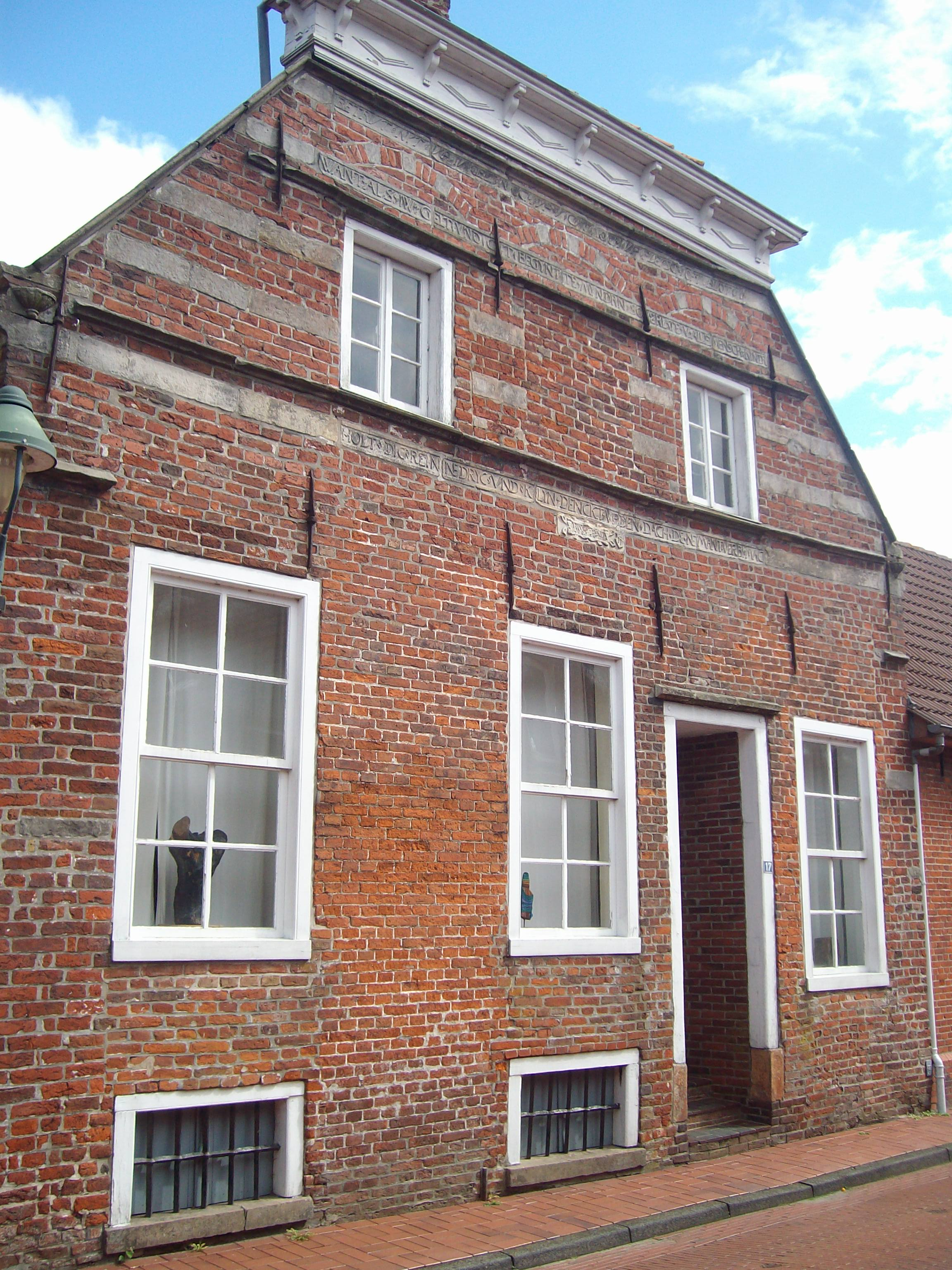 Albahaus in Jemgum, Ostfriesland